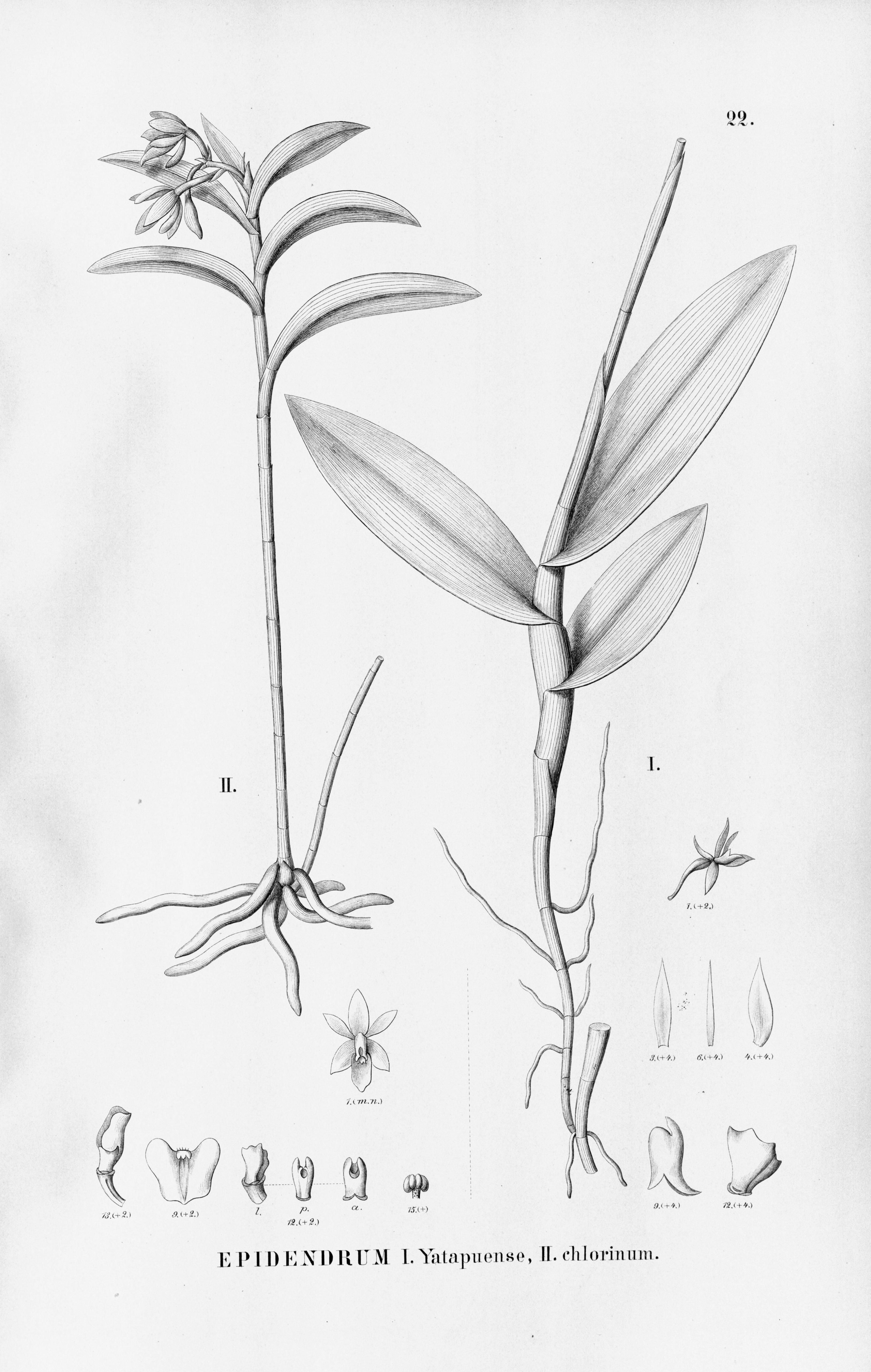 Illustration of : I. Epidendrum compressum (as syn. Epidendrum yatapuense), II. Epidendrum chlorinum